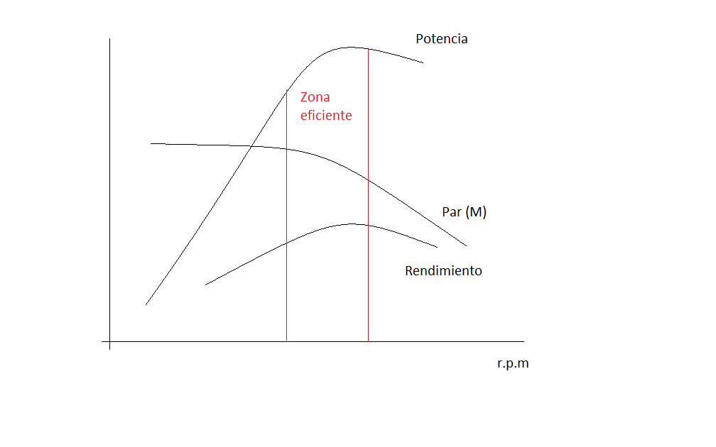 Esquema de curva par-velocidad de un motor de combustión interna